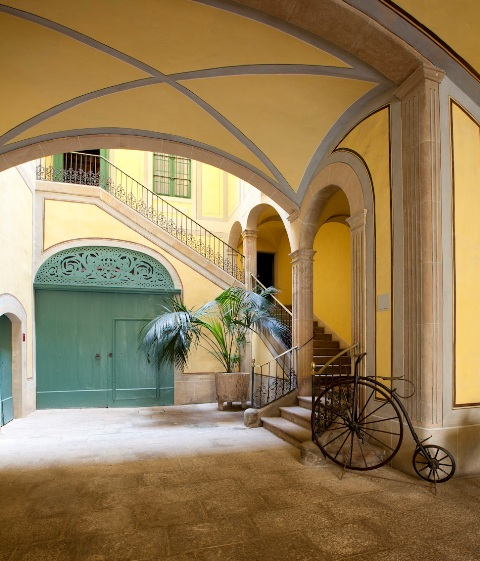 Museu Romàntic Can Papiol